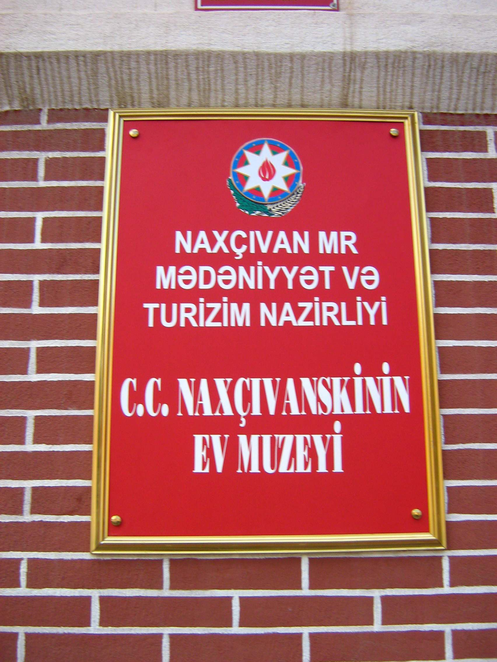 Табличка на стене дома-музея Джамшида Джафаркули оглы Нахичеванского. Улица Ататюрка, г. Нахичевань, Азербайджан